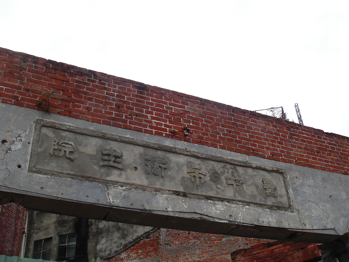 中文（台灣）: 臺中市衛生院遺址